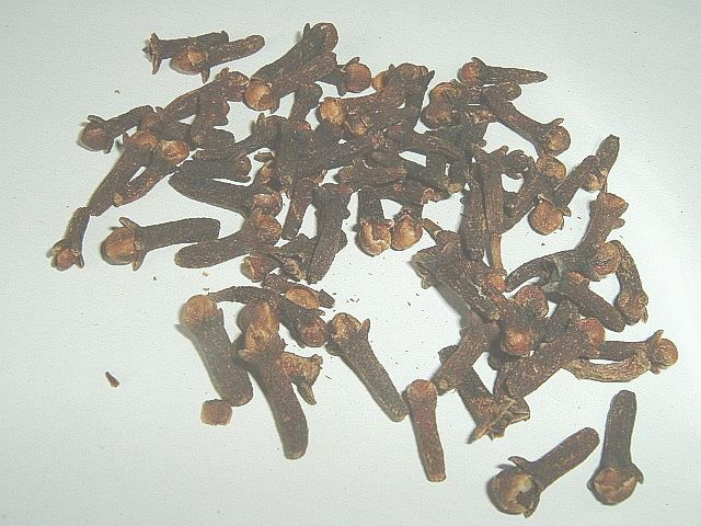 Gewürznelken